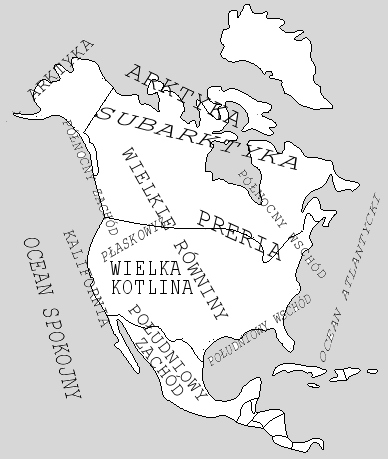 orientacyjna mapa obszarów (areałów) kulturowych Indian Ameryki Północnej. Tribal areas listed in Polish.